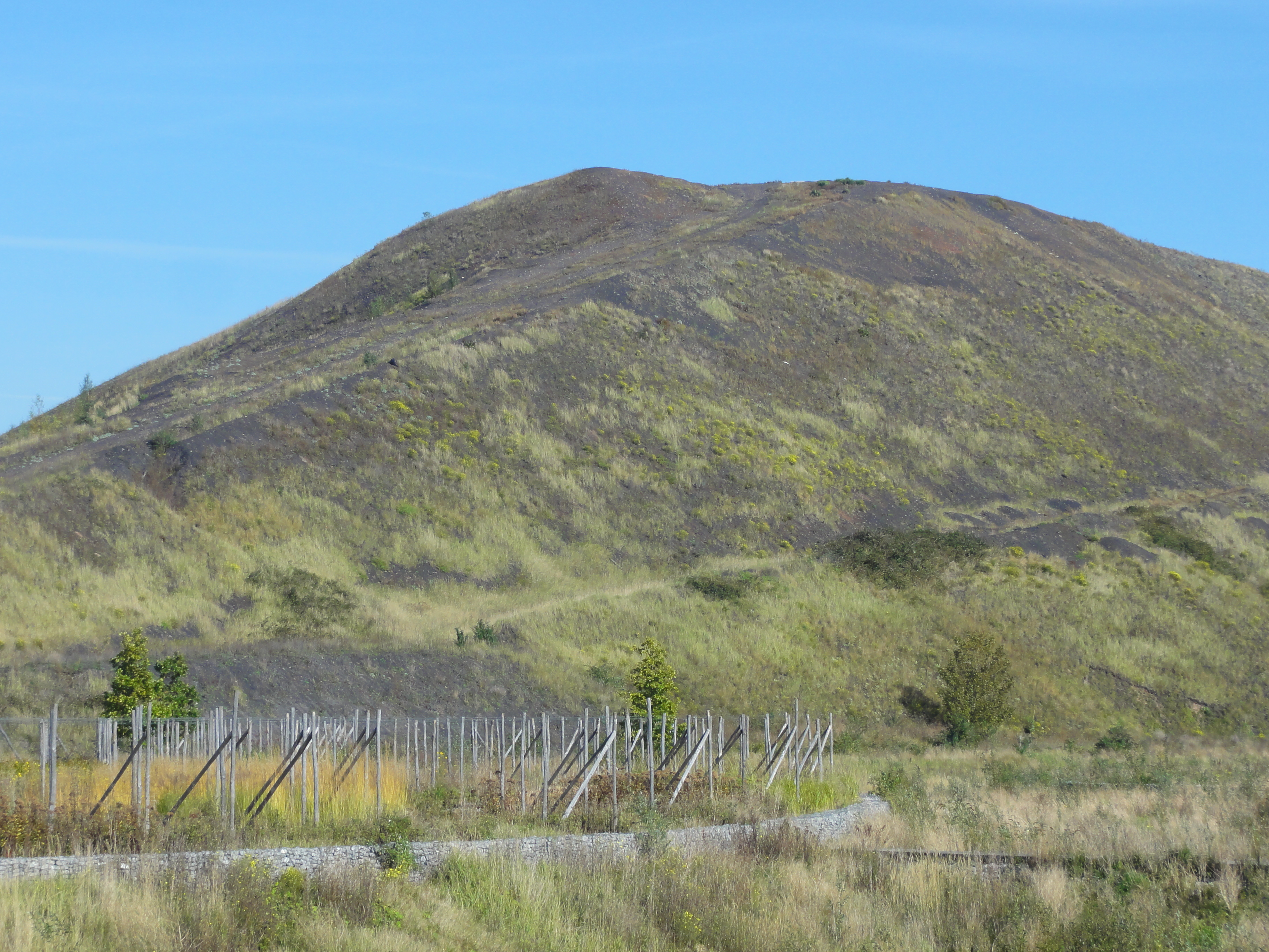 Terril n° 205 dit 1 de Drocourt, fosse n° 1 de la Compagnie des mines de Drocourt dans le bassin minier du Nord-Pas-de-Calais, Hénin-Beaumont, Pas-de-Calais, Nord-Pas-de-Calais, France. Le terril no 205 est inscrit sur la liste du patrimoine mondial de l'Unesco le 30 juin 2012 et y constitue en partie le site no 48.